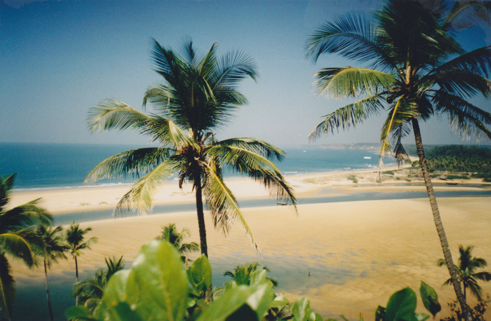 Querim (Keri) Goal, India March 2013